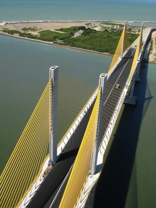 Visutý most ve Forte Redinha, poblíž města Natal v Brazíili. Tento dálniční most, který překonává řeku Potengy, byl dobudován roku 2007 a zde je zachycen ještě jako rozestavěný